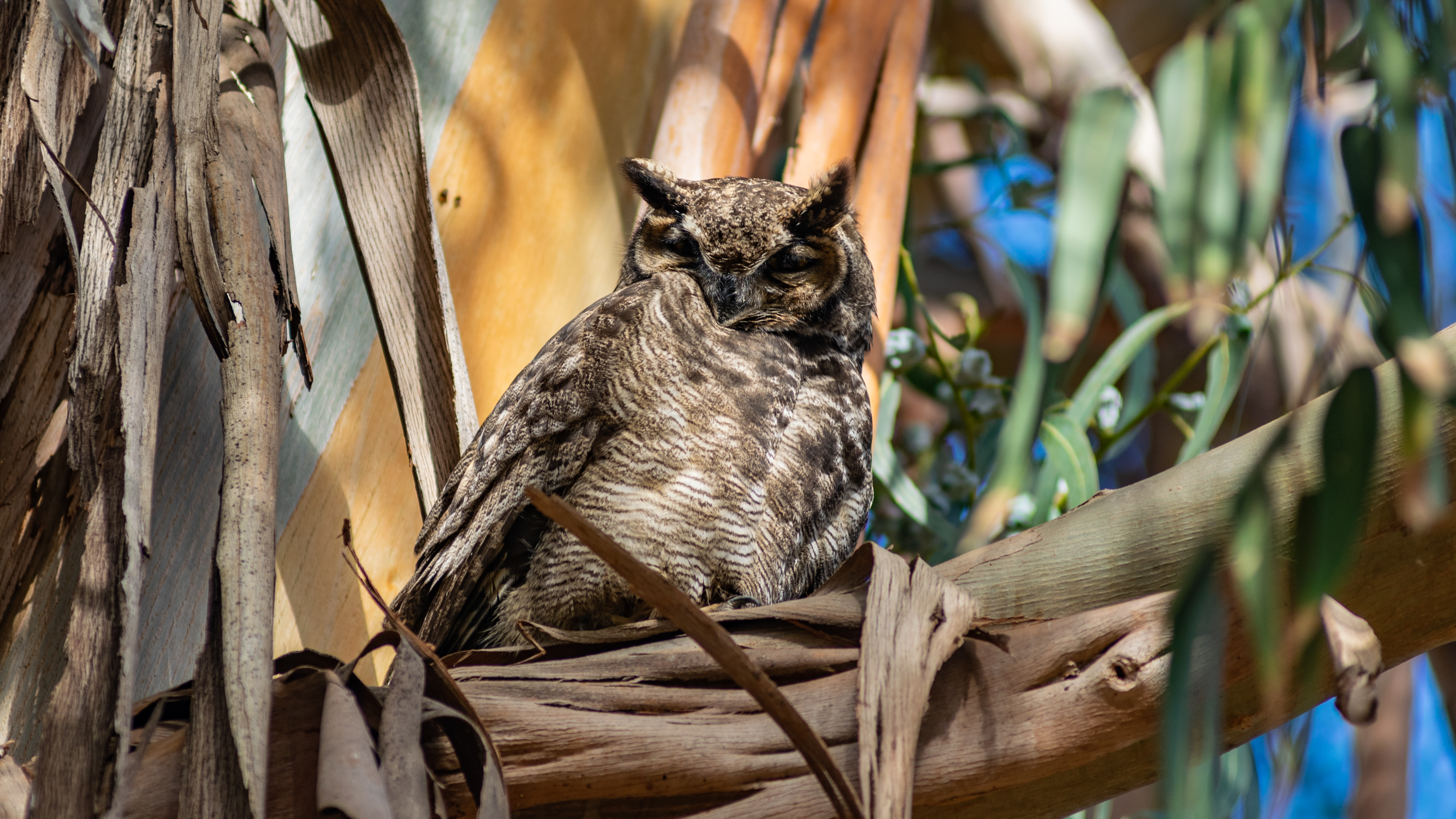 Tucúquere (Bubo virginianus magellanicus), fotografiado en el Parque Nacional Bosque Fray Jorge. Esta ave nocturna habita gran parte del territorio Chileno